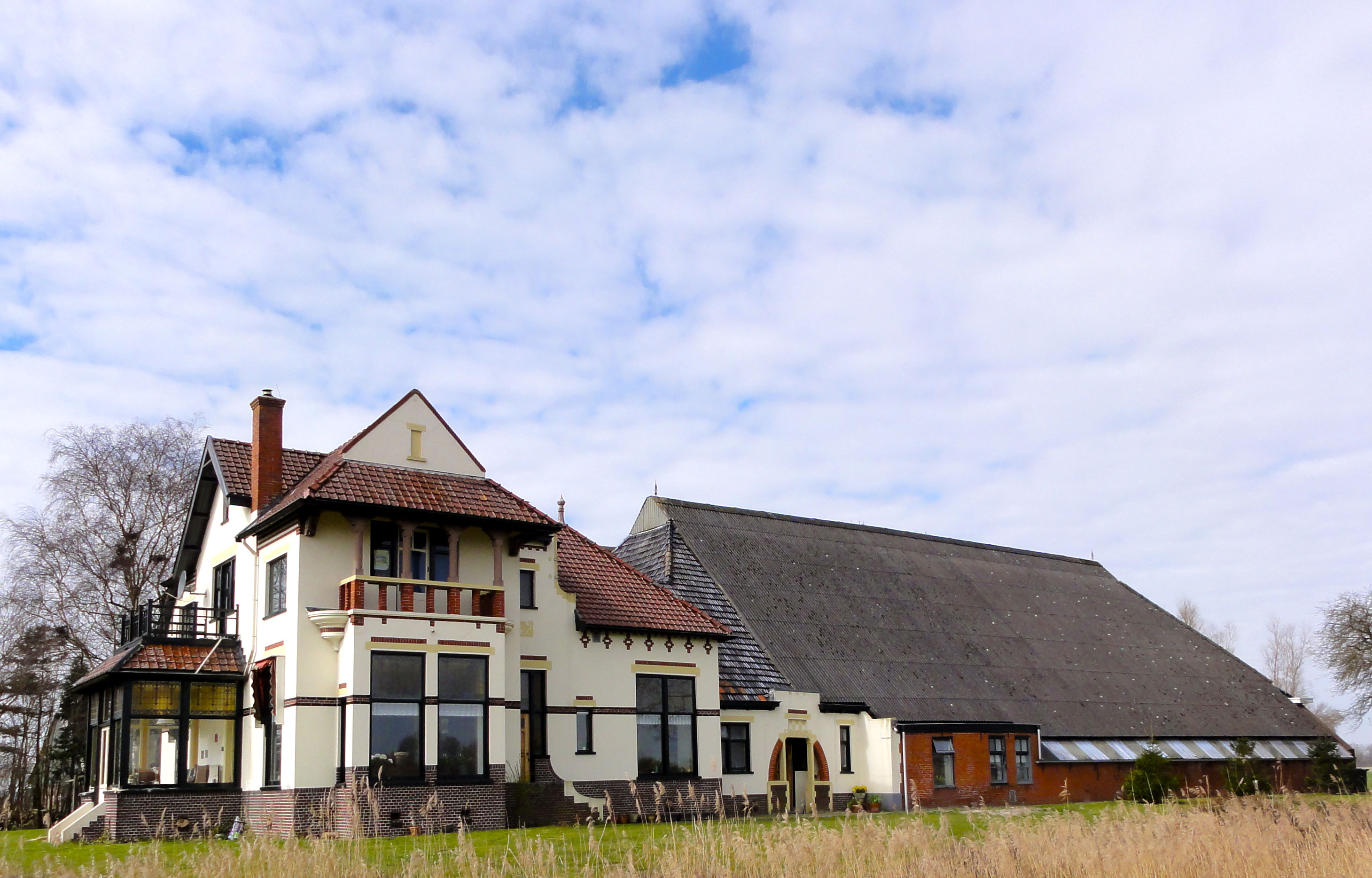 De Blokken, monumentale villaboerderij nabij Baflo, Temme Reitsema